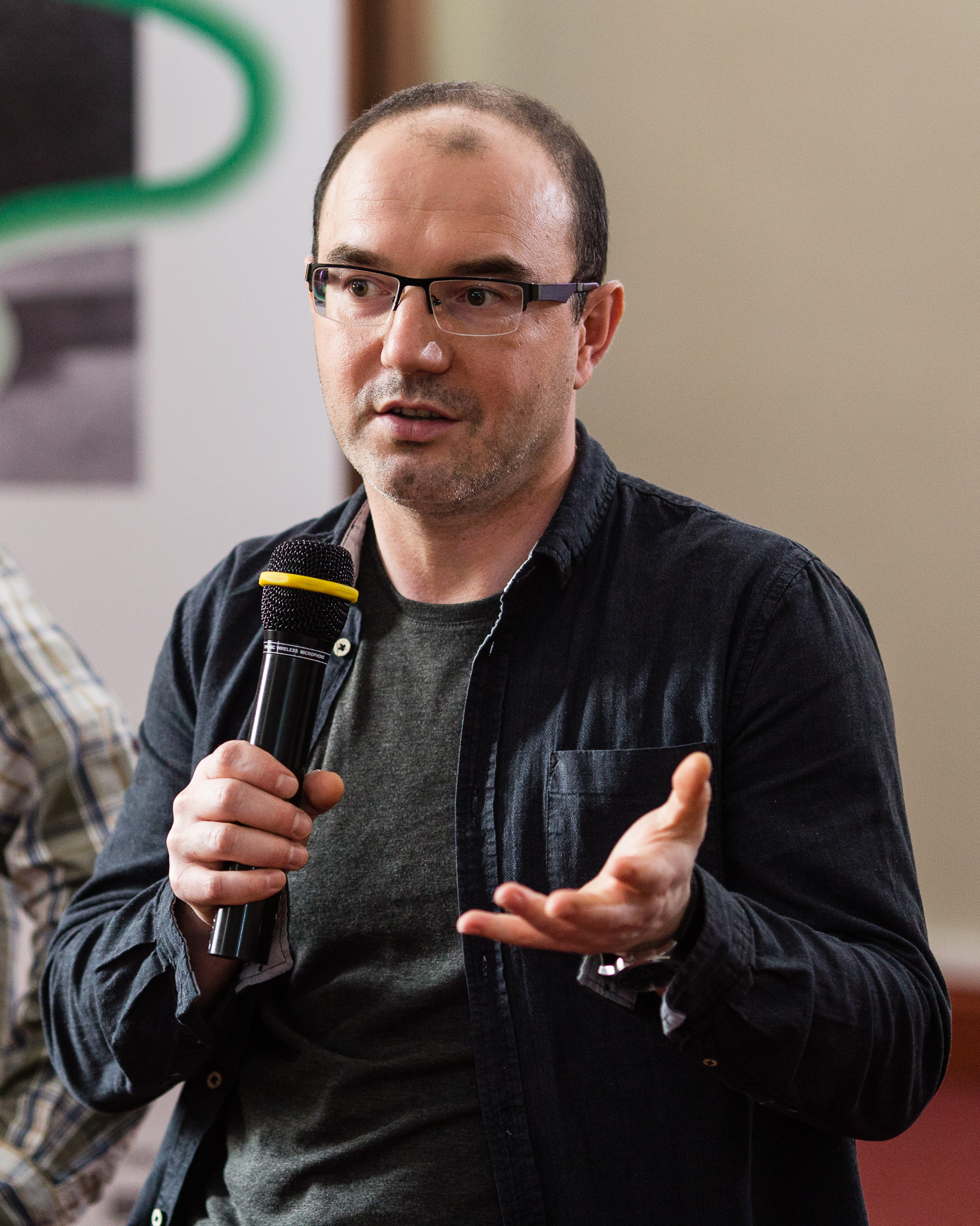 Daniel Odija, Dolnośląski Festiwal Opowiadania 2017, Świdnica